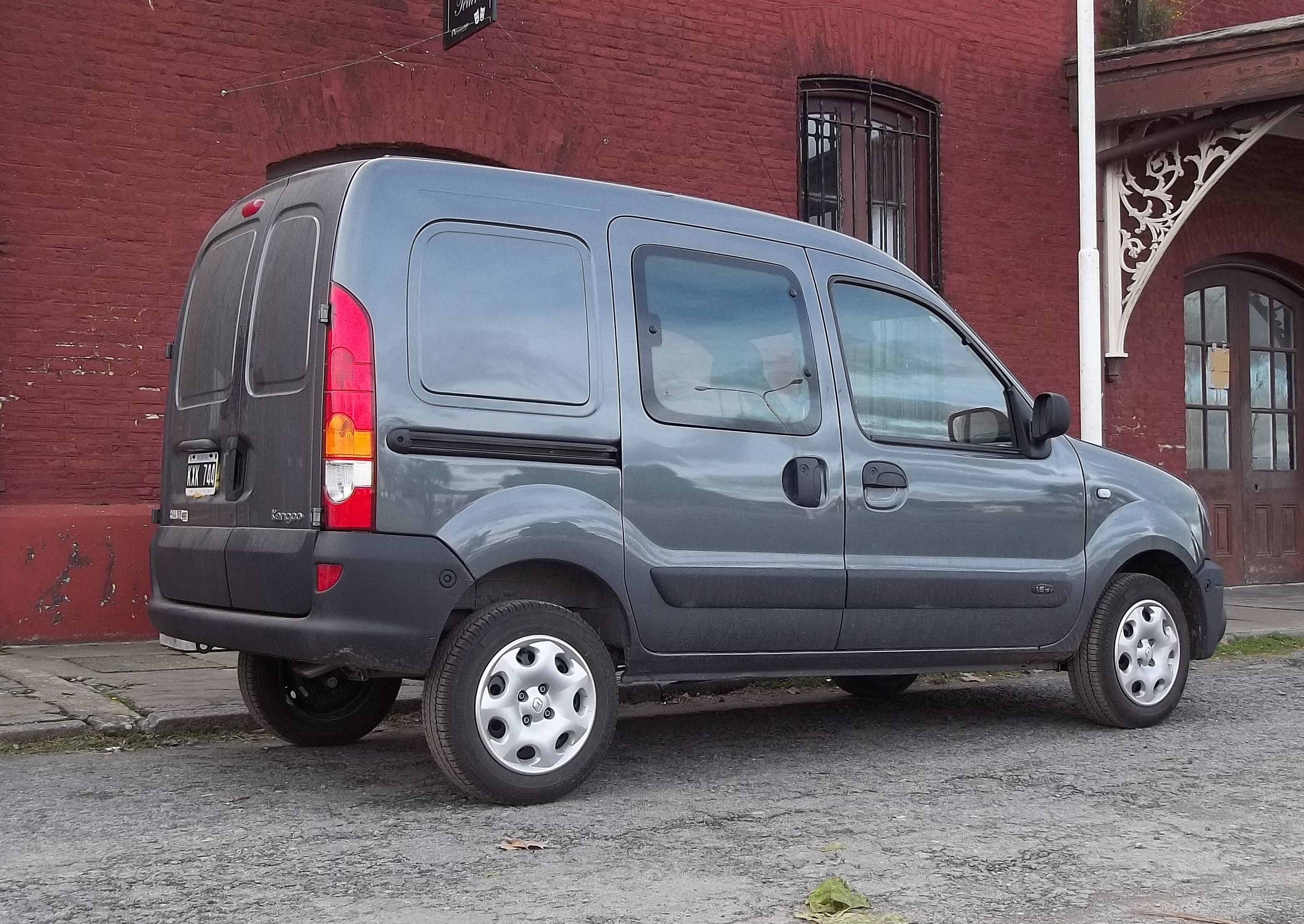 Renault Kangoo estacionado en Tandil, Argentina